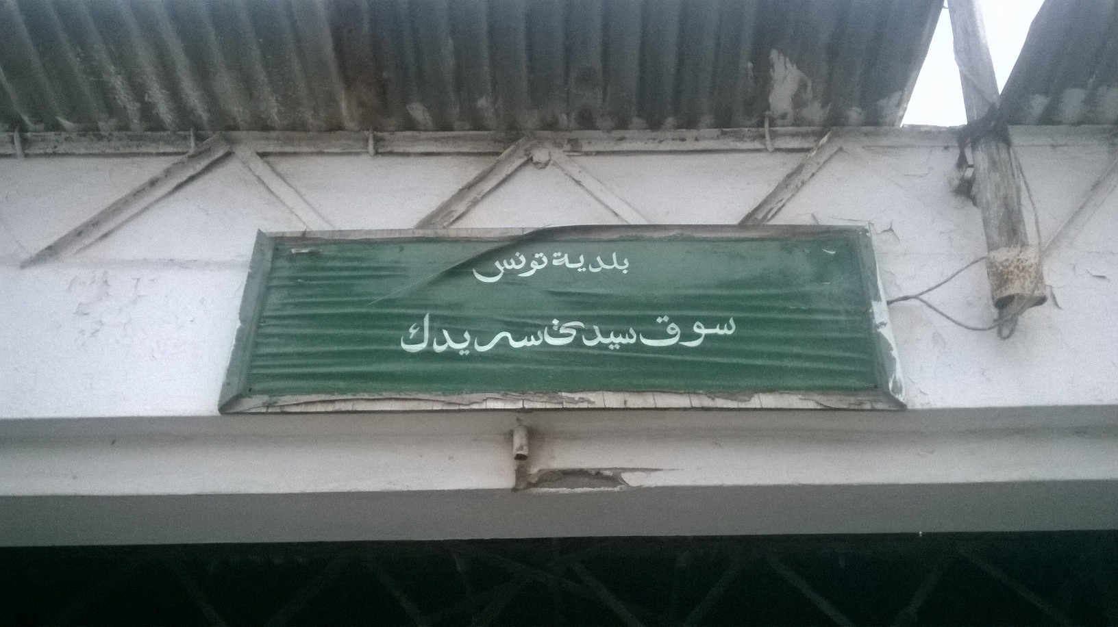 El Hafsia , Tunis الحفصية ، تونس